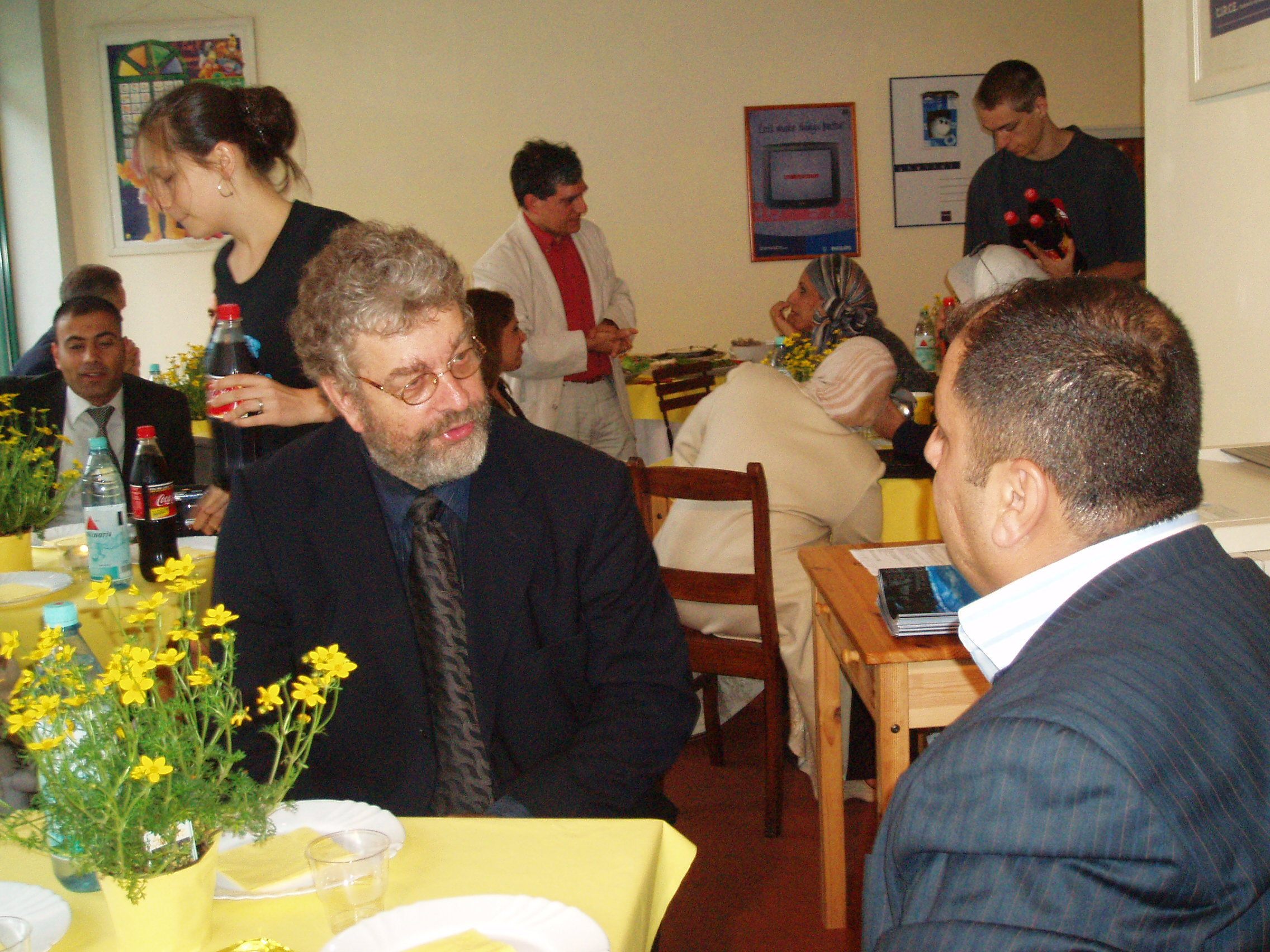 Gerd Greune with journalists in the IFIAS office in Brussels 2006